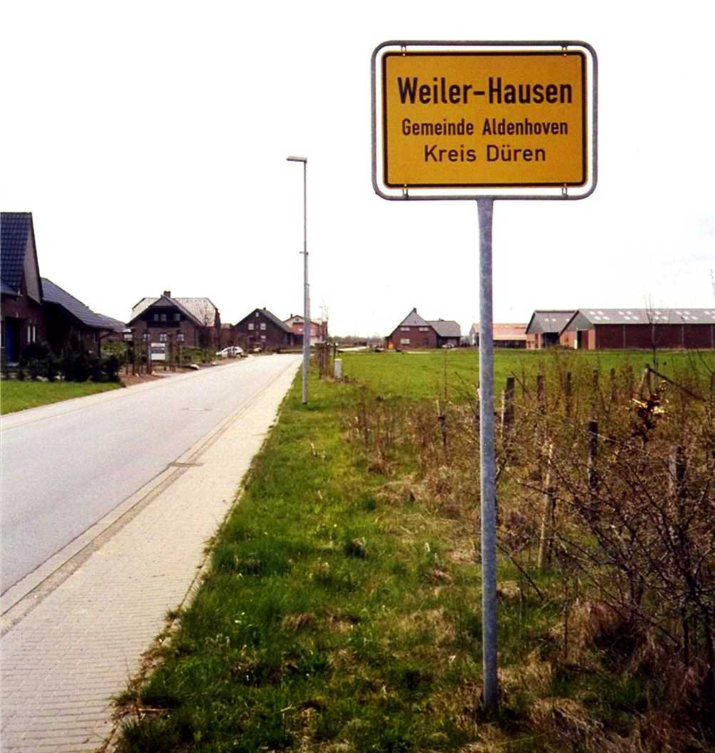 Weiler Hausen bei Aldenhoven - fotografiert und eingescannt von Benutzer: Eschweiler 2006